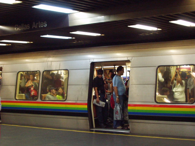 Metro de Caracas, Bellas Artes Station. Caracas, Venezuela.